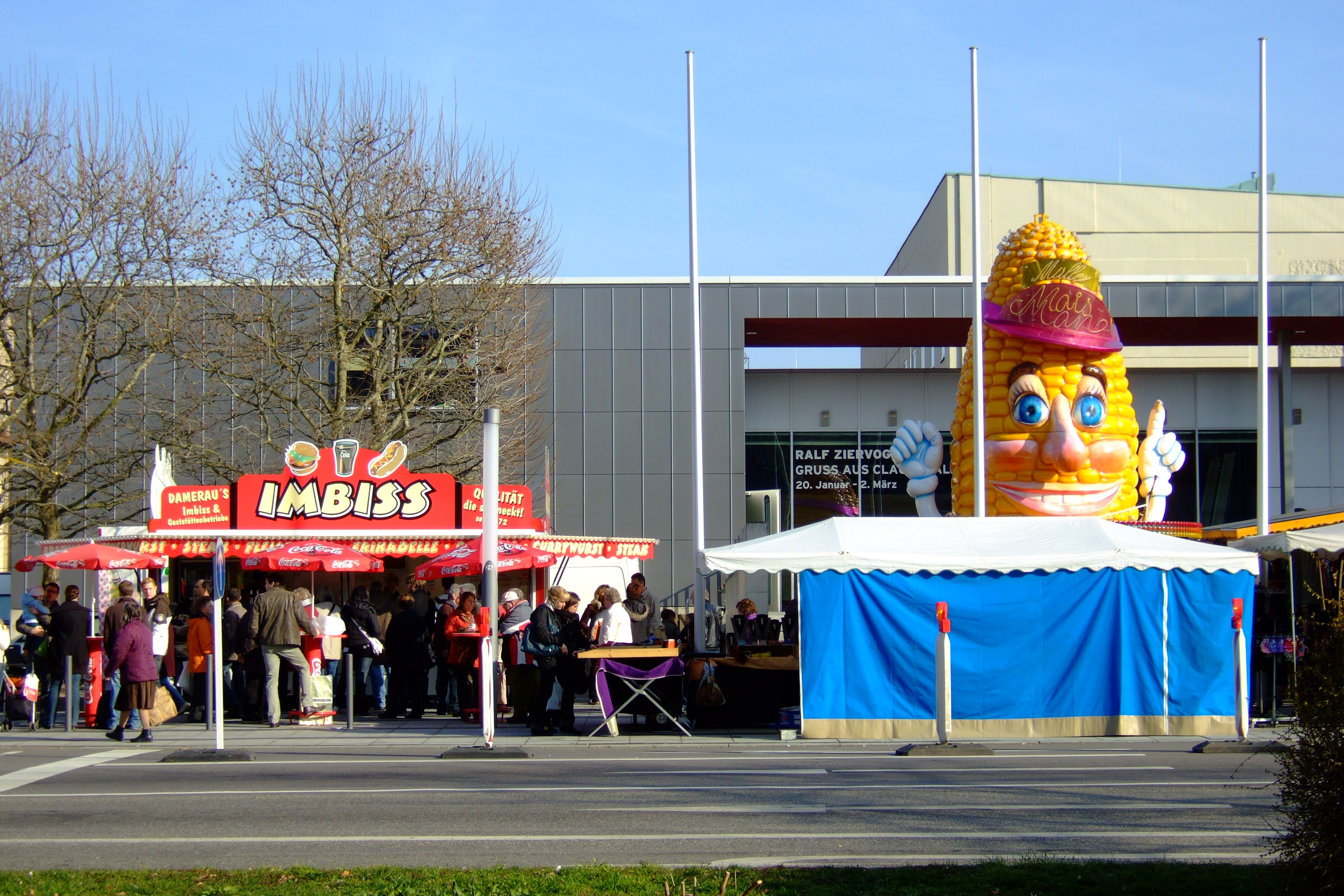 „Heilbronner Pferdemarkt“ Heilbronn/Germany